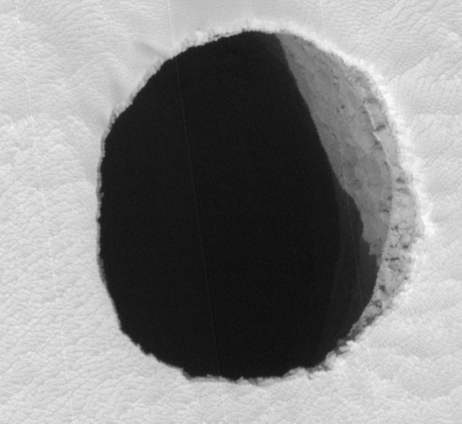 Possible cave entrance on Arsia Mons.